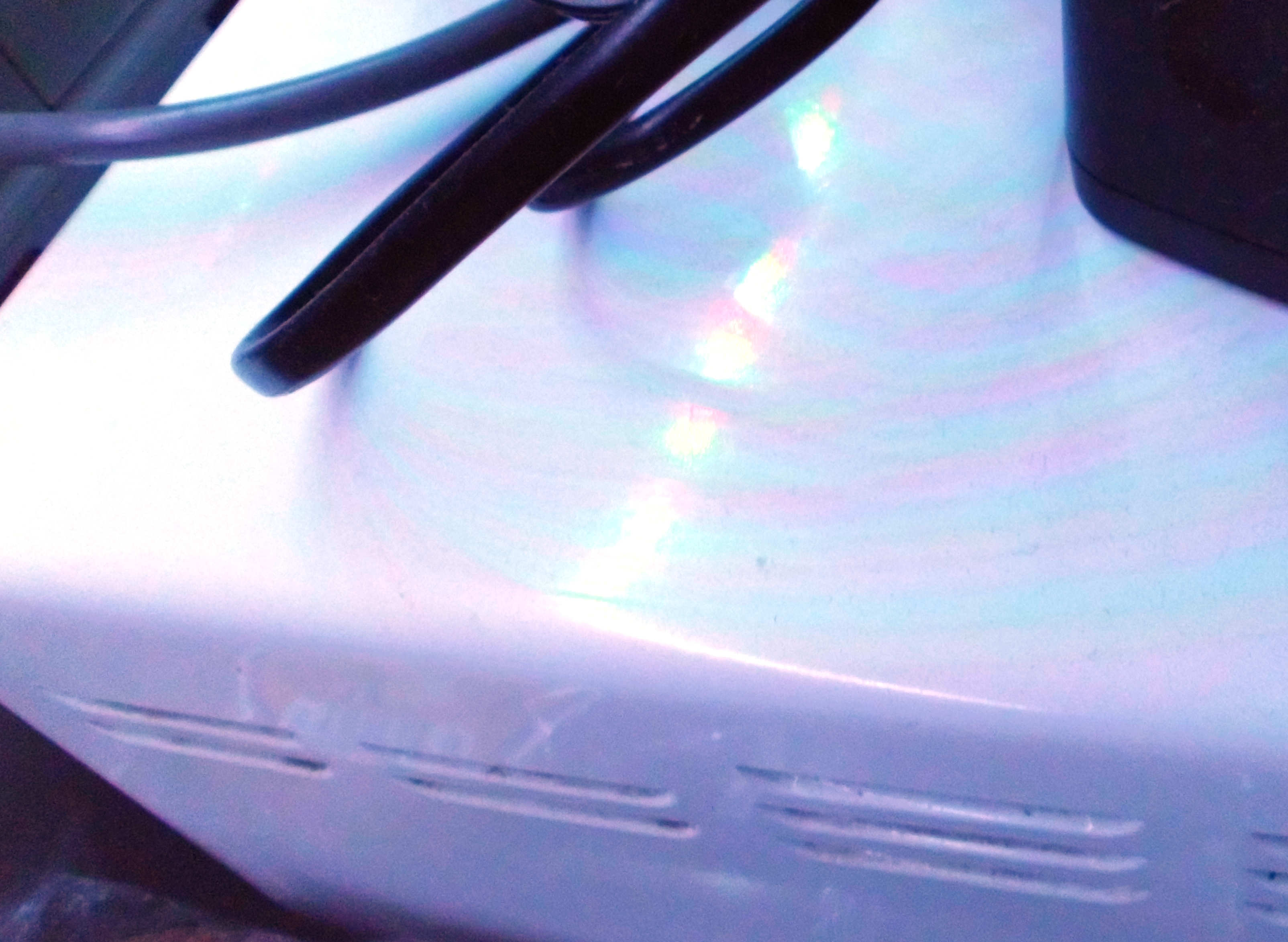 Освещение создаваемое светодиодной лентой многоцветной с монохромными светодиодами. Включен режим белого свечения. При общем белом фоне освещения, тени от предметов радужные: красно-сине-зелёные. Эффект возникает из-за того, что светодиоды красного, синего и зелёного цвета свечения на такой ленте разнесены друг от друга на несколько сантиметров и тень от предмета от света каждой падает со смещением от света от других, в отличие от многоцветной светодиодной ленты с RGB-светодиодами, где точки свечения разных цветов расположены близко в пределах от доли до нескольких миллиметров и объединены в один рассеиватель.